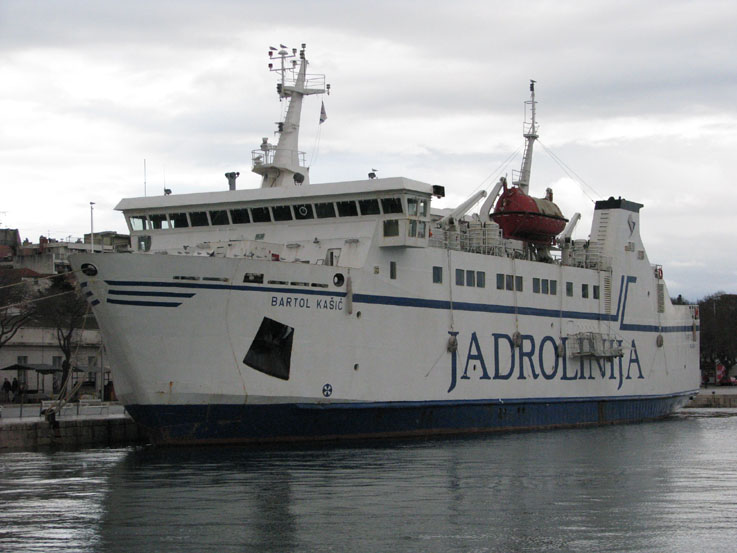 Trajekt Bartol Kašić u Splitu